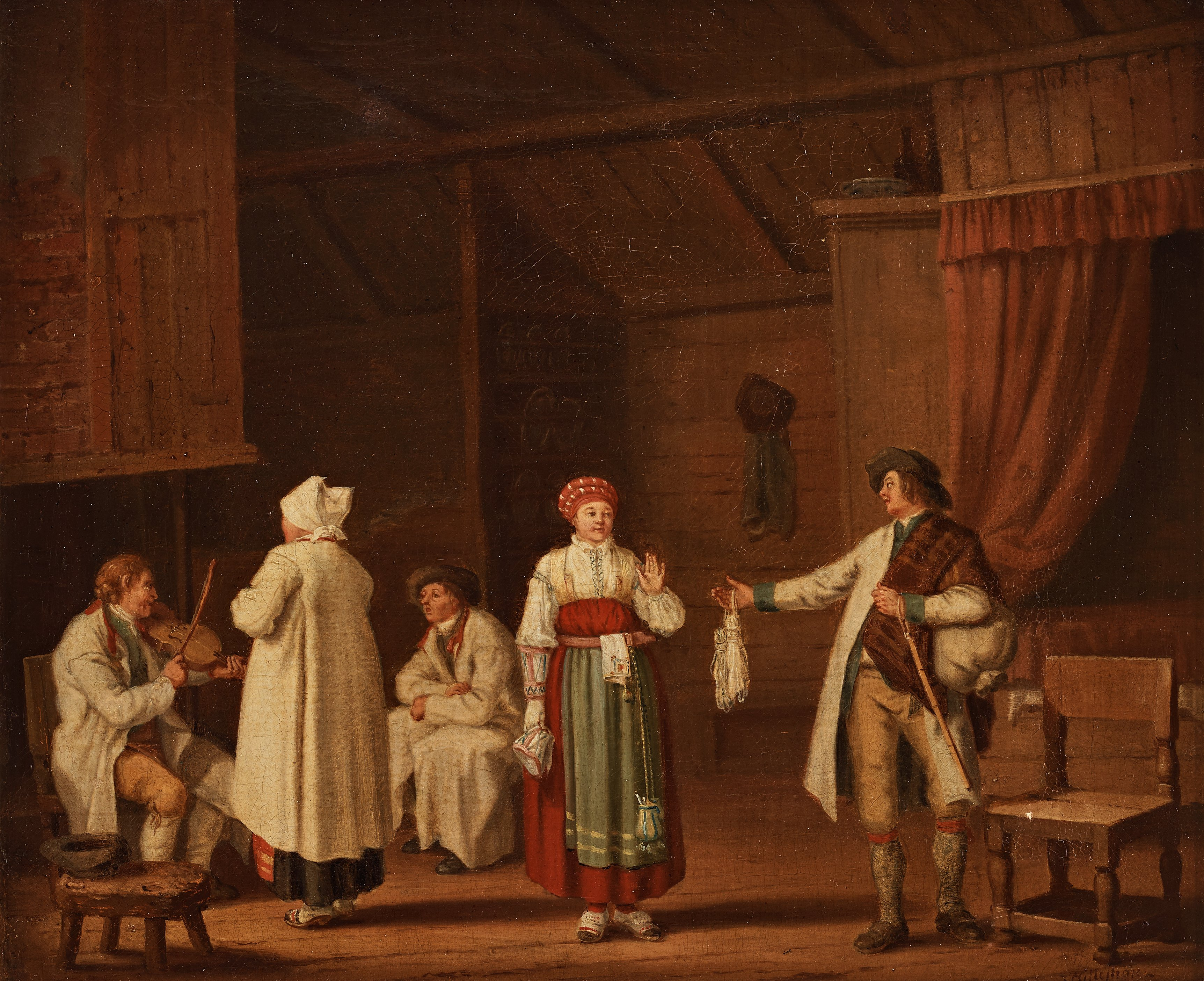 Målning av Pehr Hilleström som visar en interiör med personer från Vingåker.